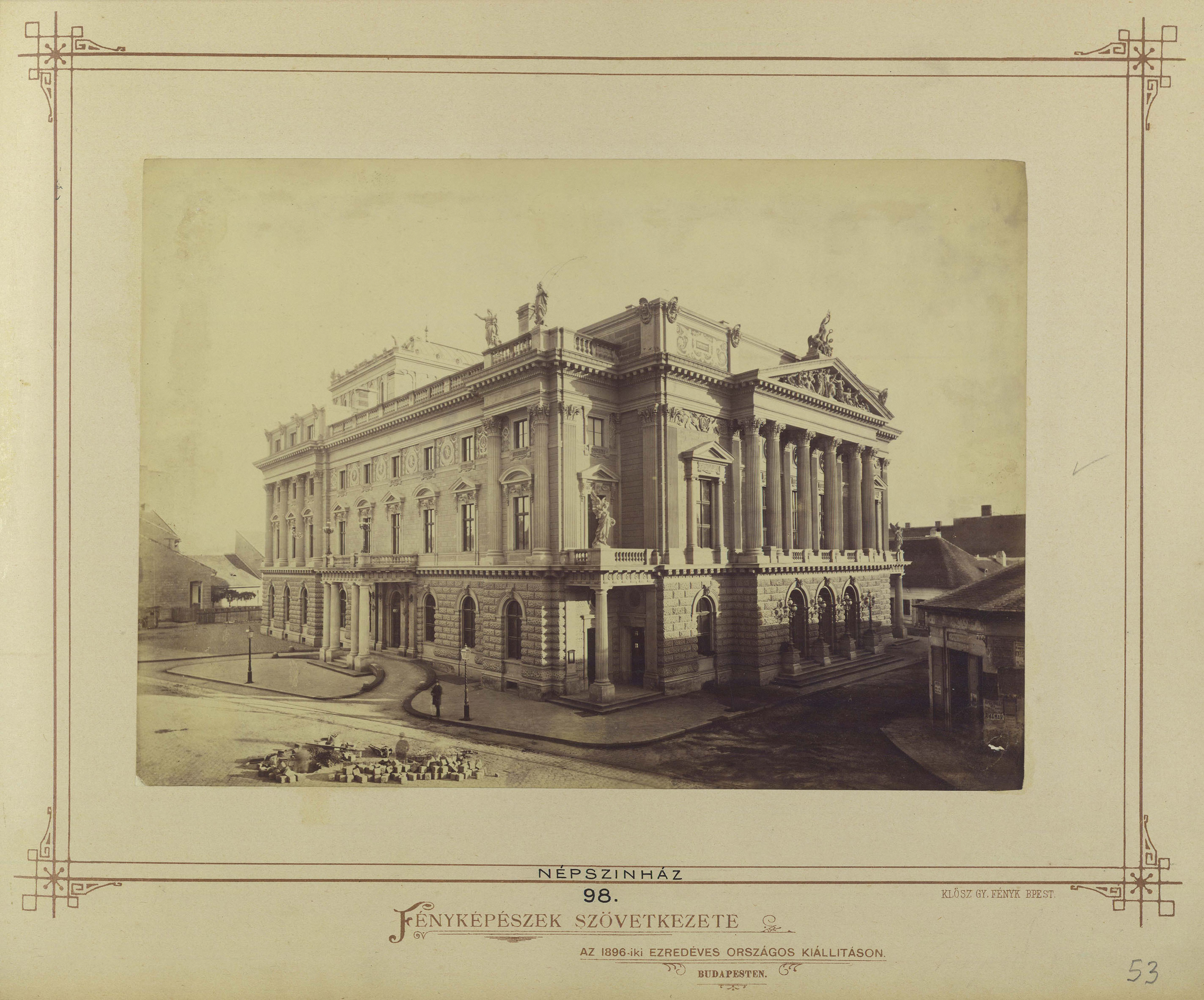 Népszínház (a későbbi Nemzeti Színház) a mai Blaha Lujza téren a Rákóczi (Kerepesi) út felől nézve. A felvétel 1875 körül készült. A kép forrását kérjük így adja meg: Fortepan / Budapest Főváros Levéltára. Levéltári jelzet: HU.BFL.XV.19.d.1.05.103 Location: Hungary, Budapest VIII. Tags: Fellner and Helmer-design, Budapest